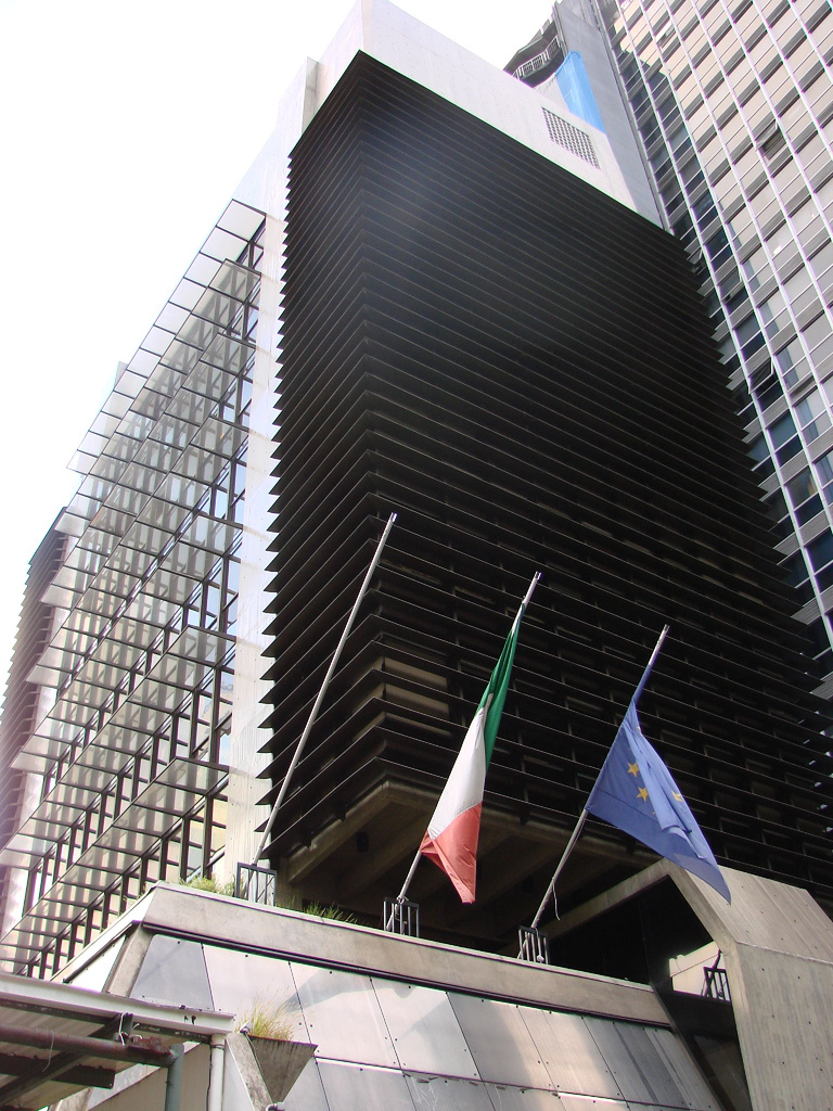 Nova sede do Consulado-Geral da Itália em São Paulo (na Avenida Paulista).